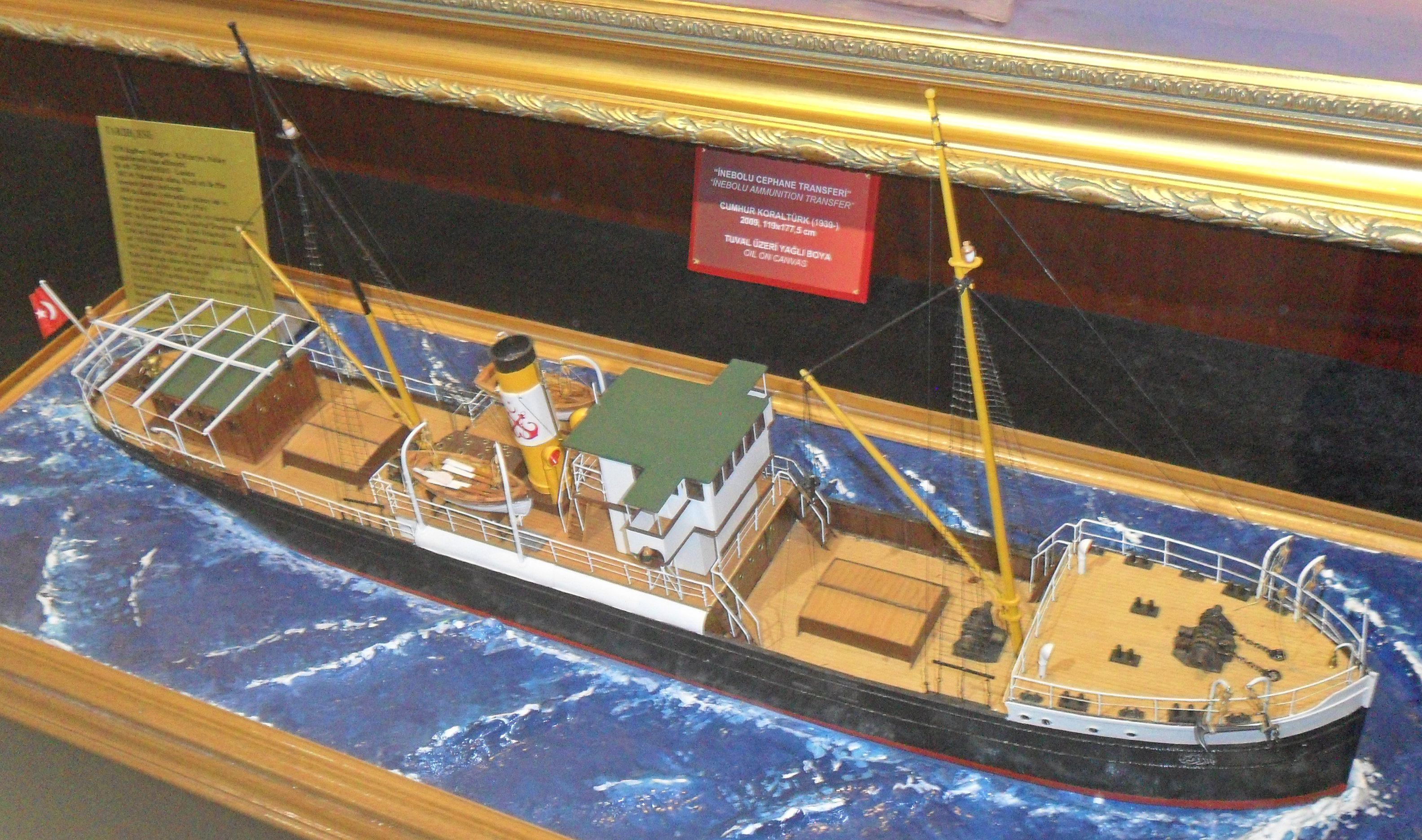 Mersin Deniz Müzesinde sergilenmekte olan ve Cemil Akçe ile Antonio Benzolese tarafından 1999 yılında hazırlanan SS Bandırma tam gemi modeli.